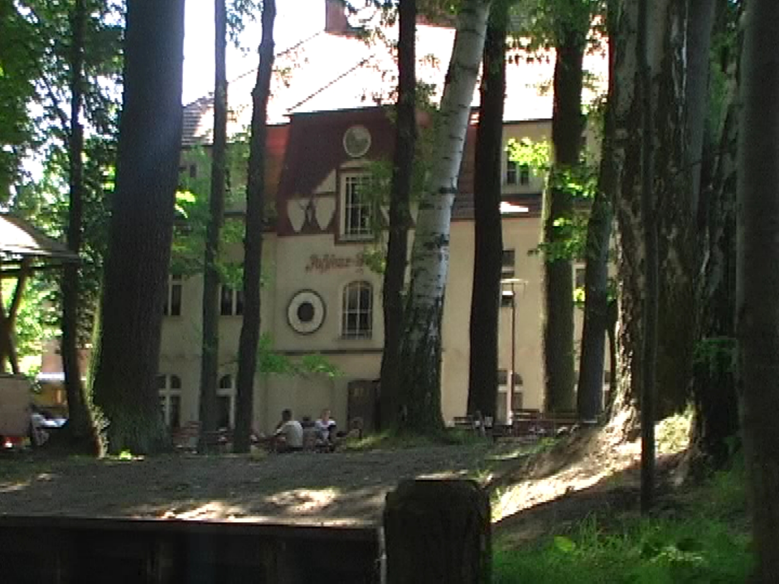 Pohlenzowy hosćenc, Borkowy (Błóta)